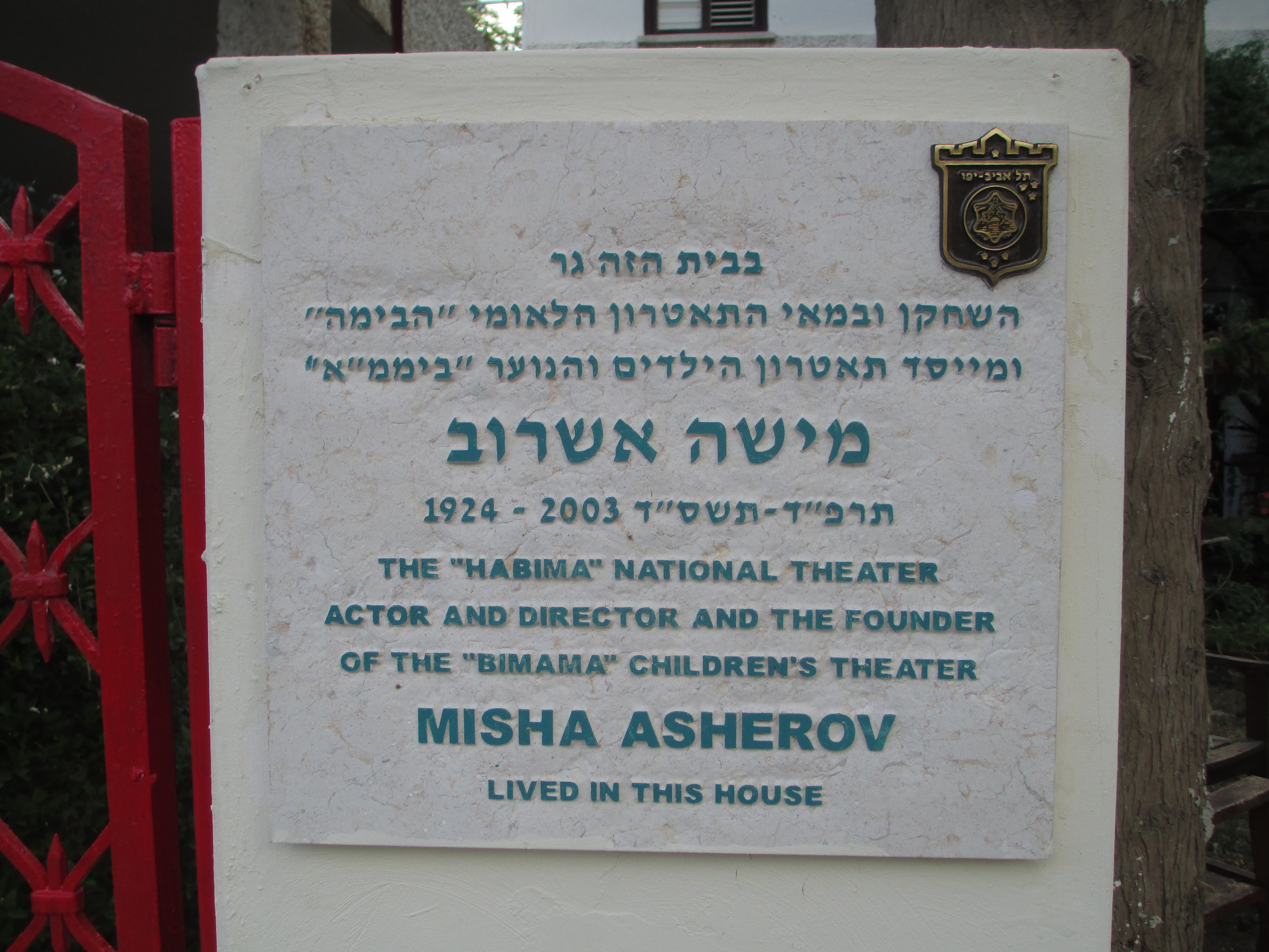 לוחית זיכרון לשחקן מישה אשרוב על ביתו ברח' אלקחי 13 בתל אביב